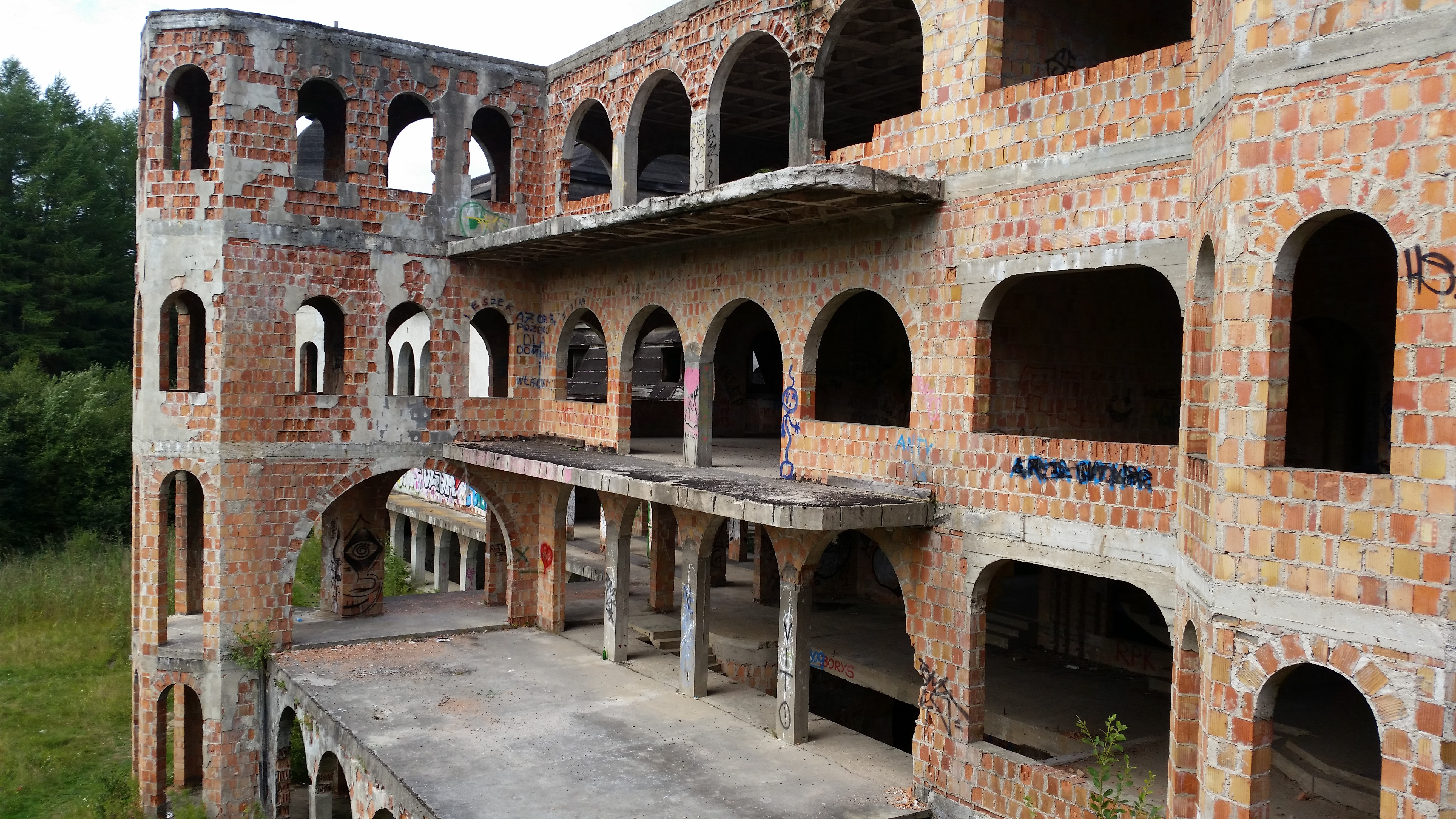 Widok na zamek w Łapalicach